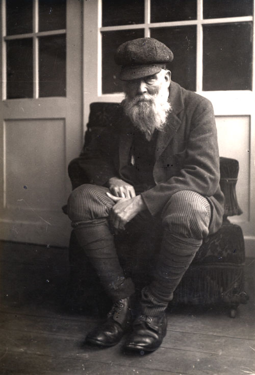 Hungarian painter László Mednyánszky